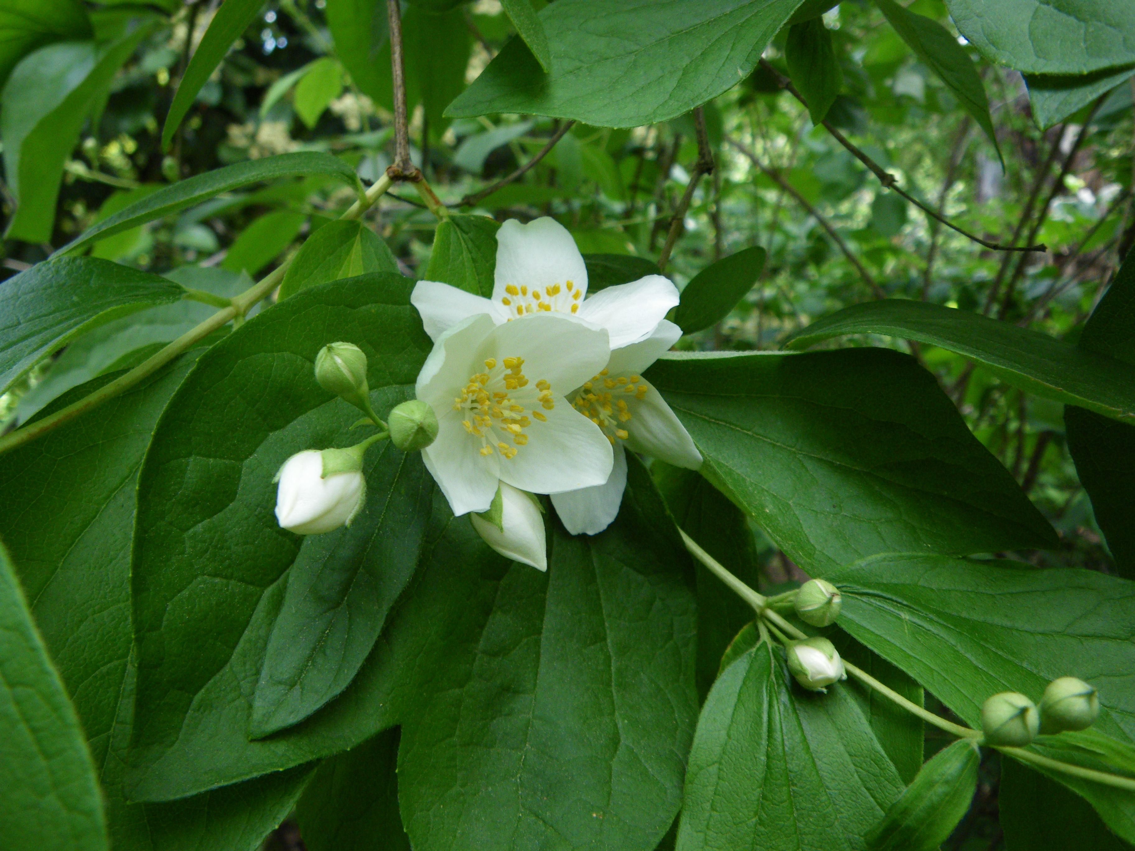 Philadelphus pubescens. Real Jardín Botánico, Madrid, España.